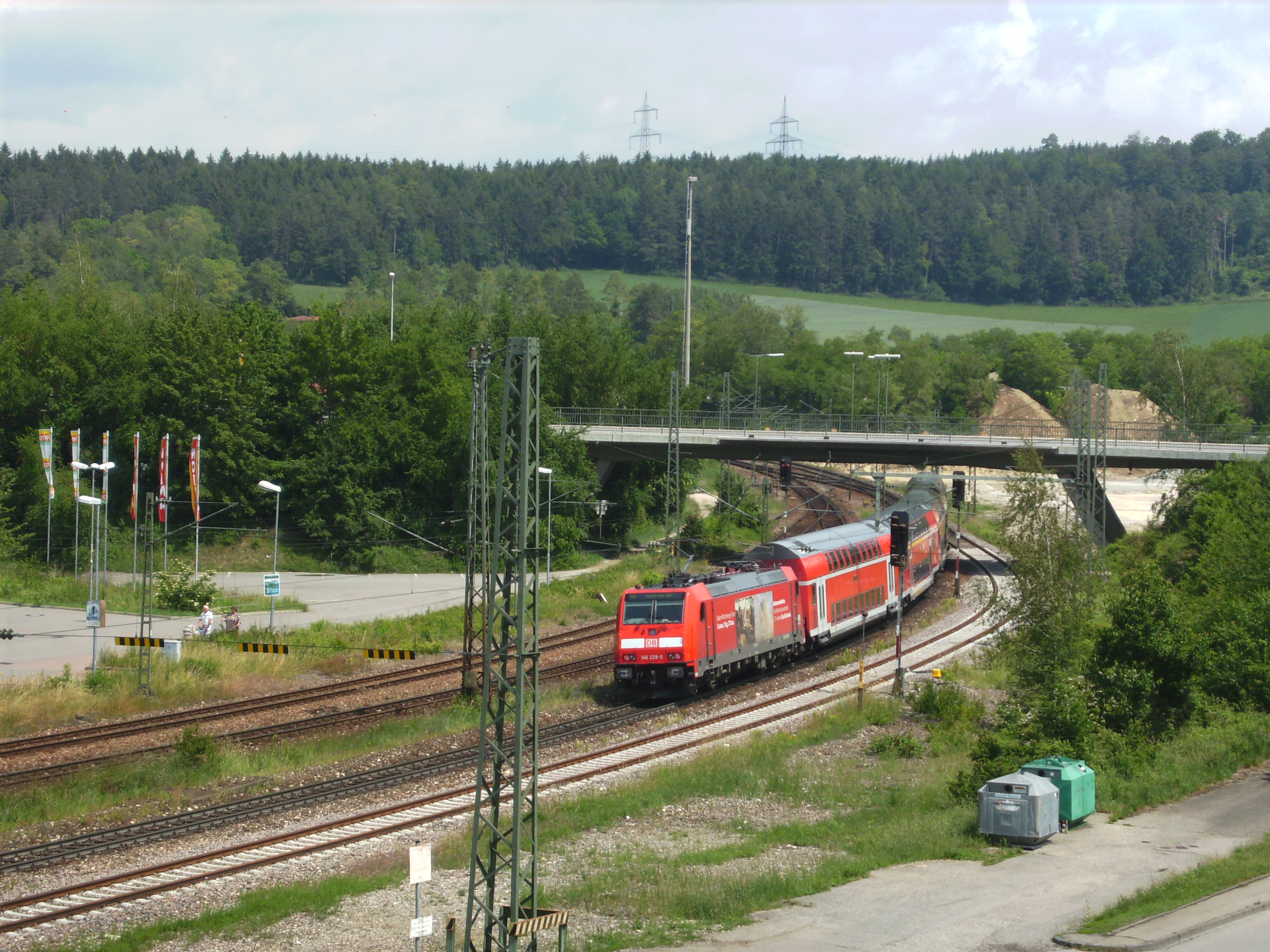 Ein Regional-Express der Linie Konstanz-Karlsruhe verlässt den Bahnhof Engen Richtung Norden